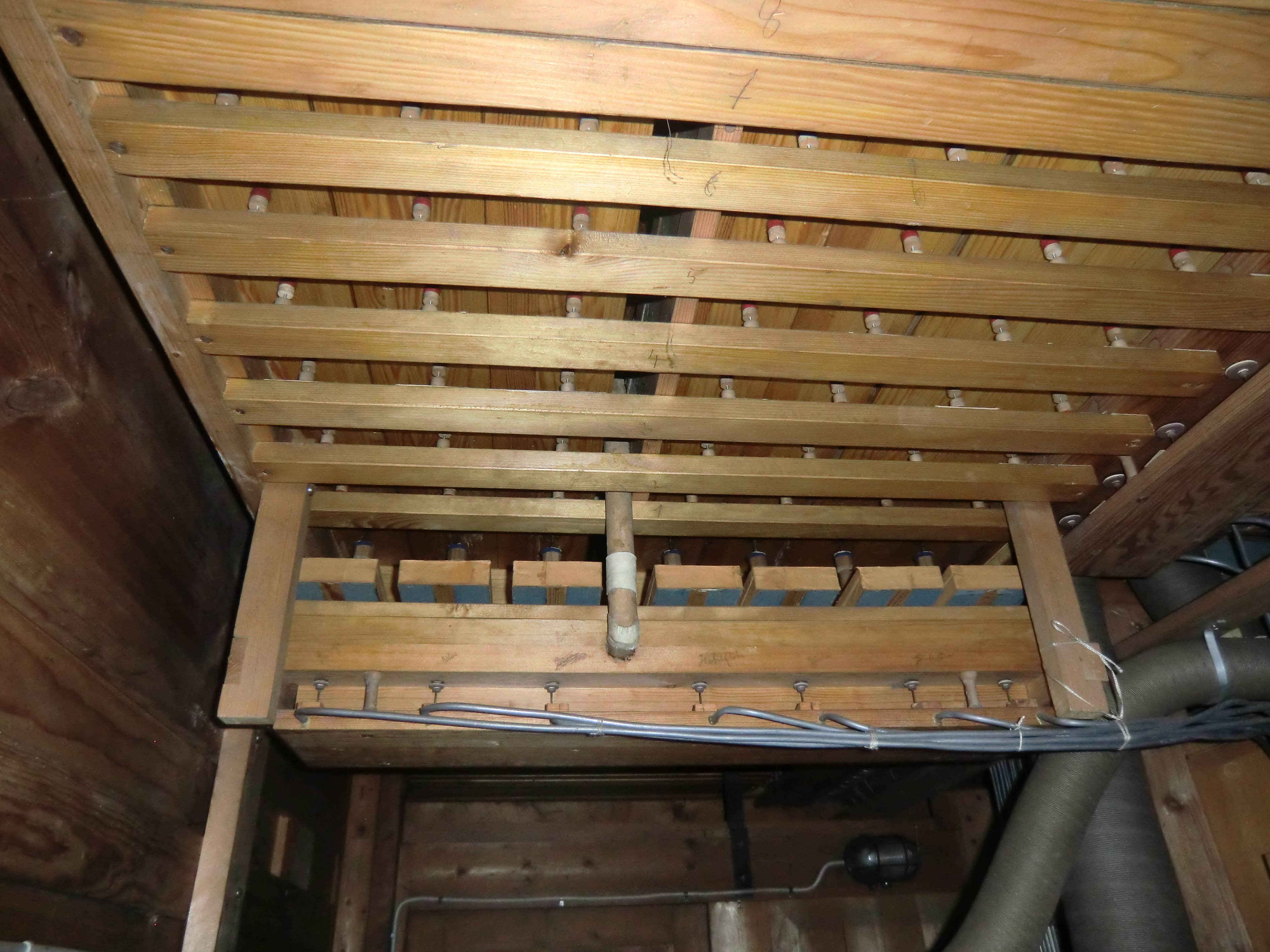 Orgelbauer Carl Horn: eine Windlade I. Man. (C-Seite) von unten